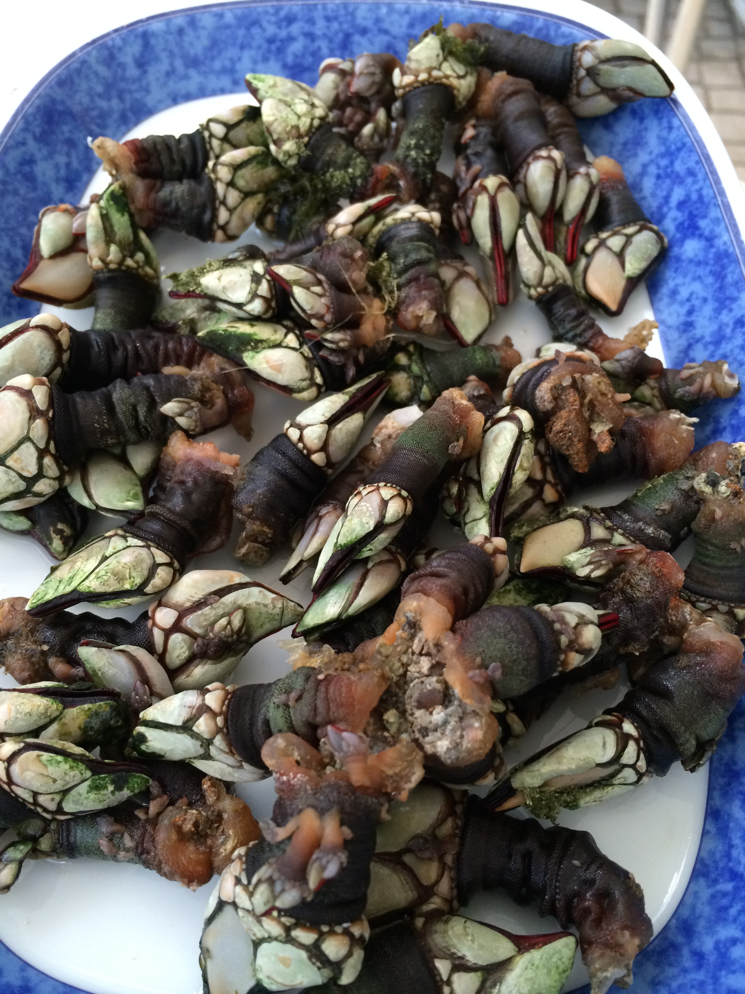 zubereitet